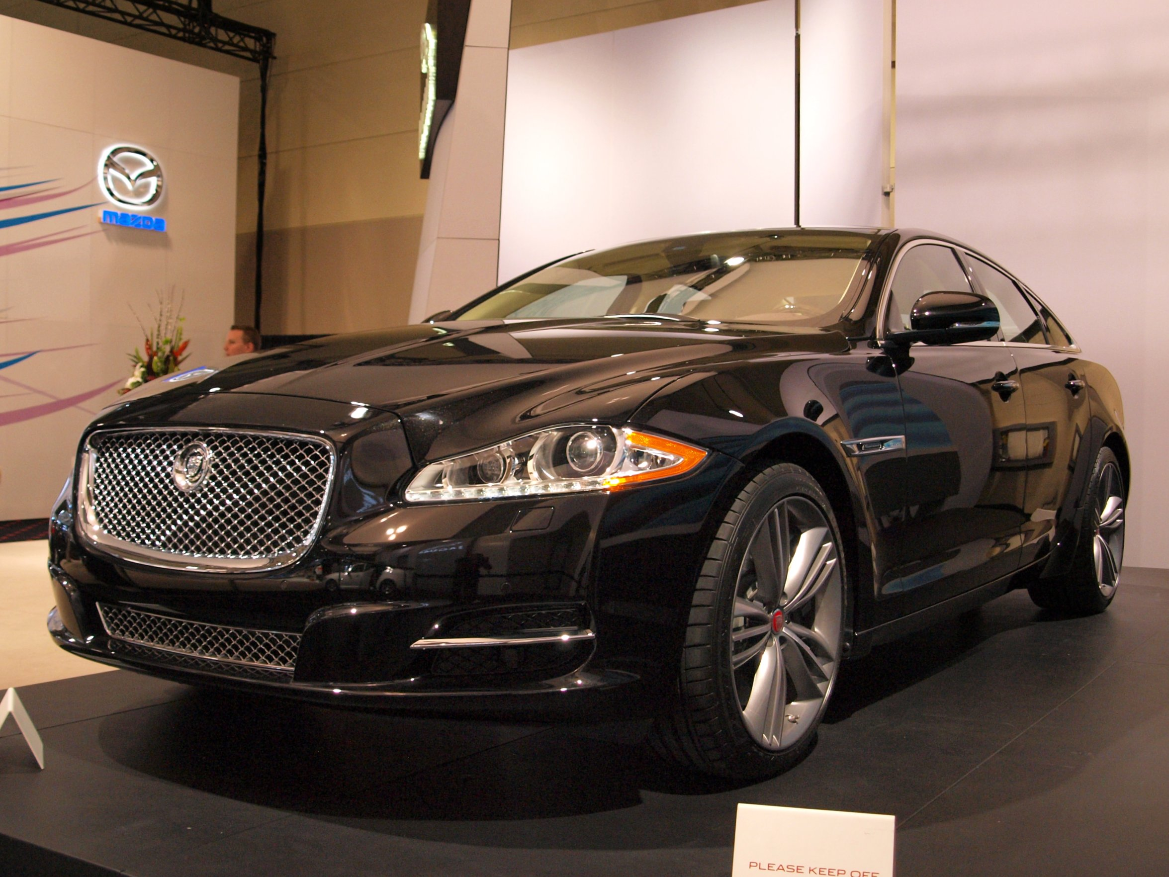 2011 Jaguar XJ